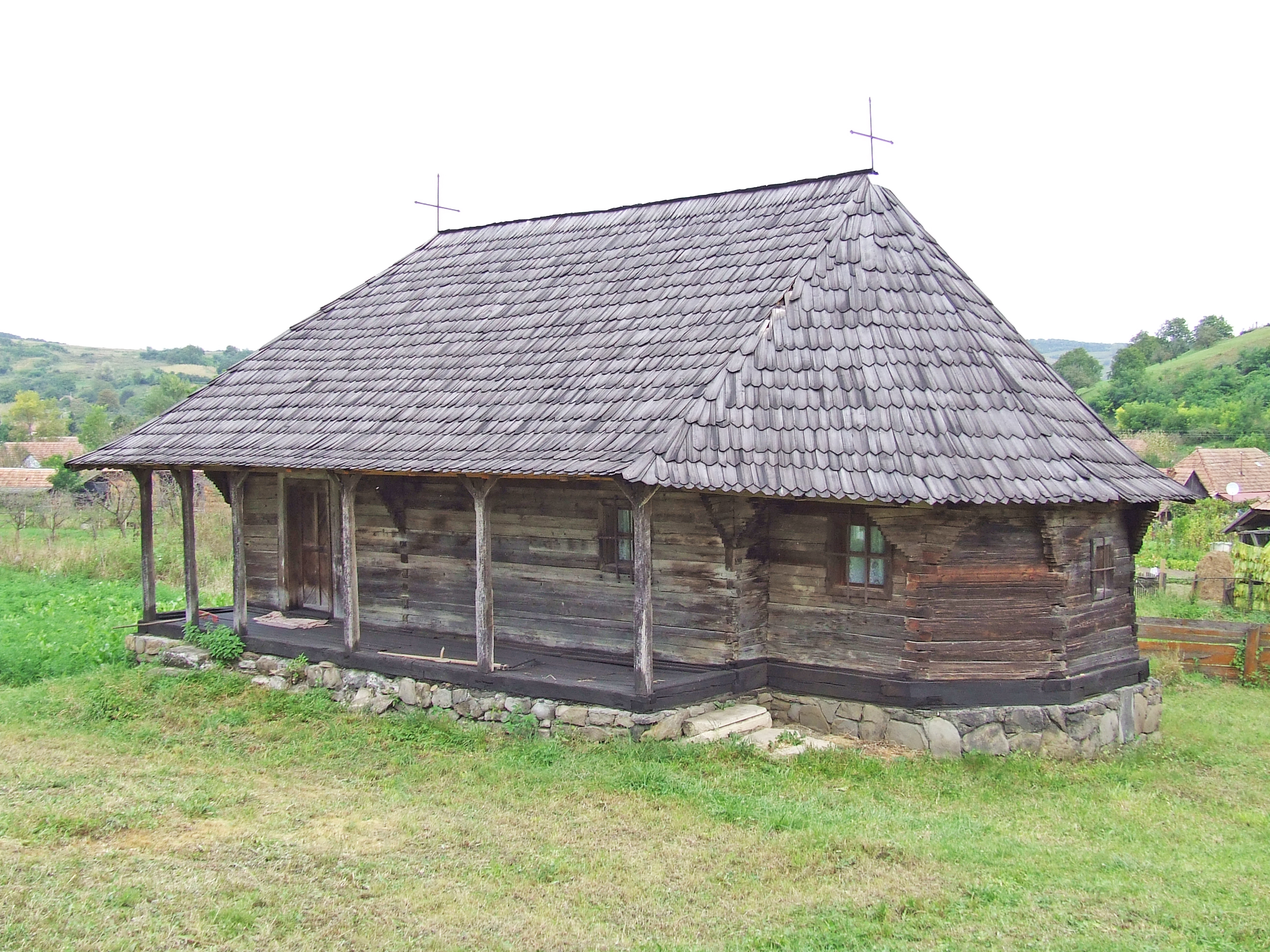 Biserica de lemn din Culpiu, judeţul Mureş.